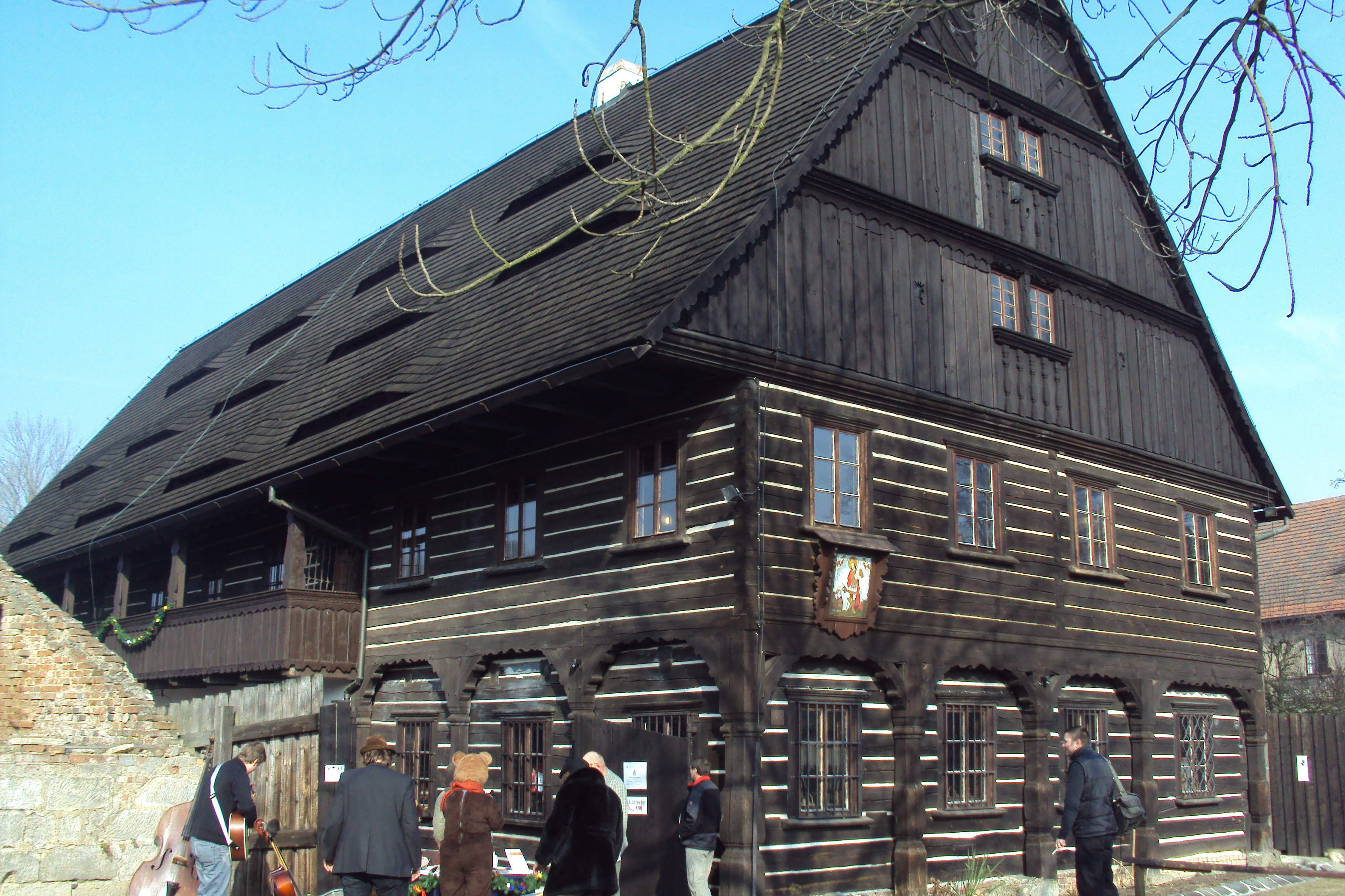 Vísecká rychta, pobočka českolipského muzea, v obci Kravaře zvenku